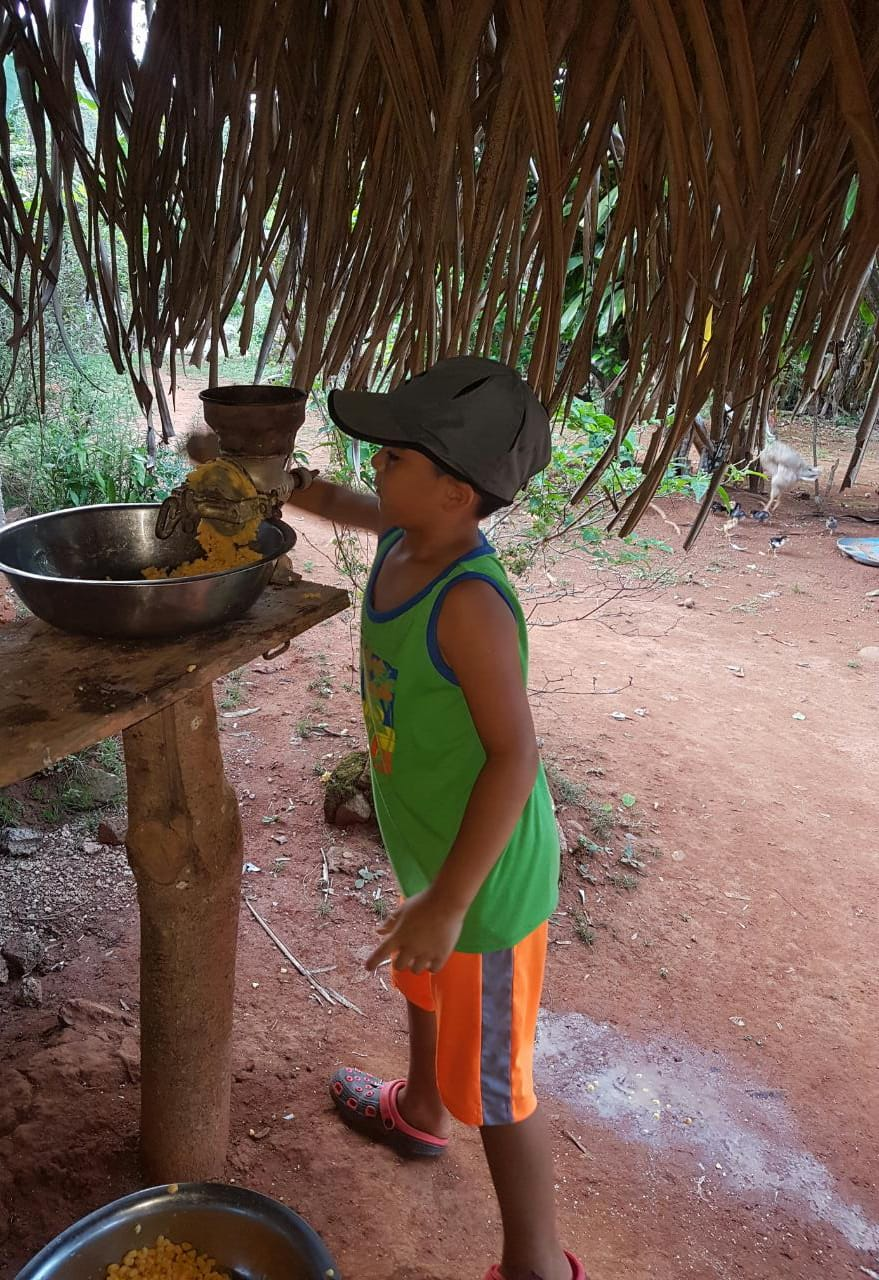 el molino